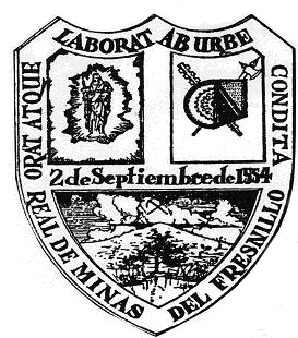 Escudo de la Ciudad de Fresnillo